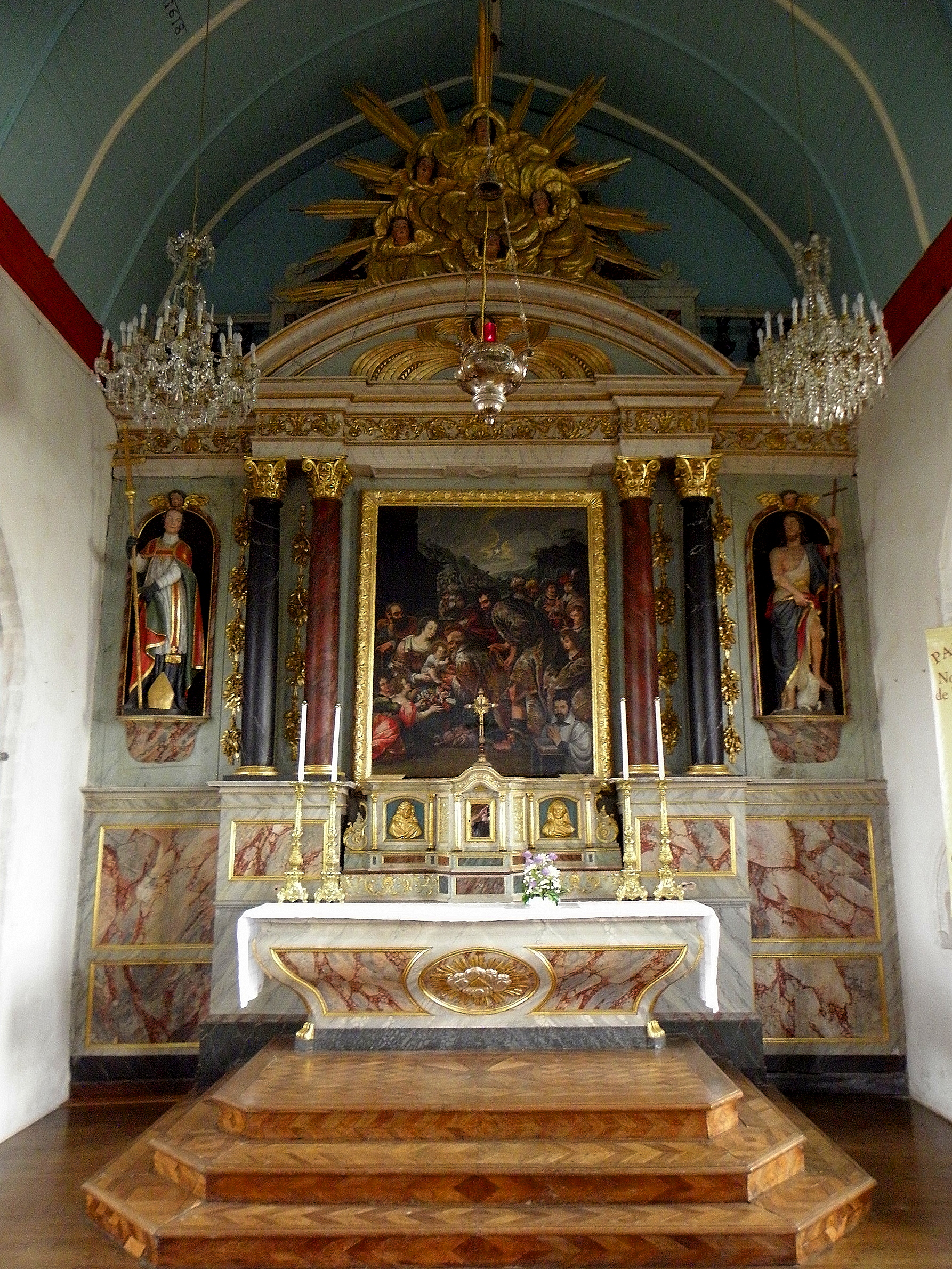 Maître-autel et son retable. Église Saint-Martin de Moutiers (35).